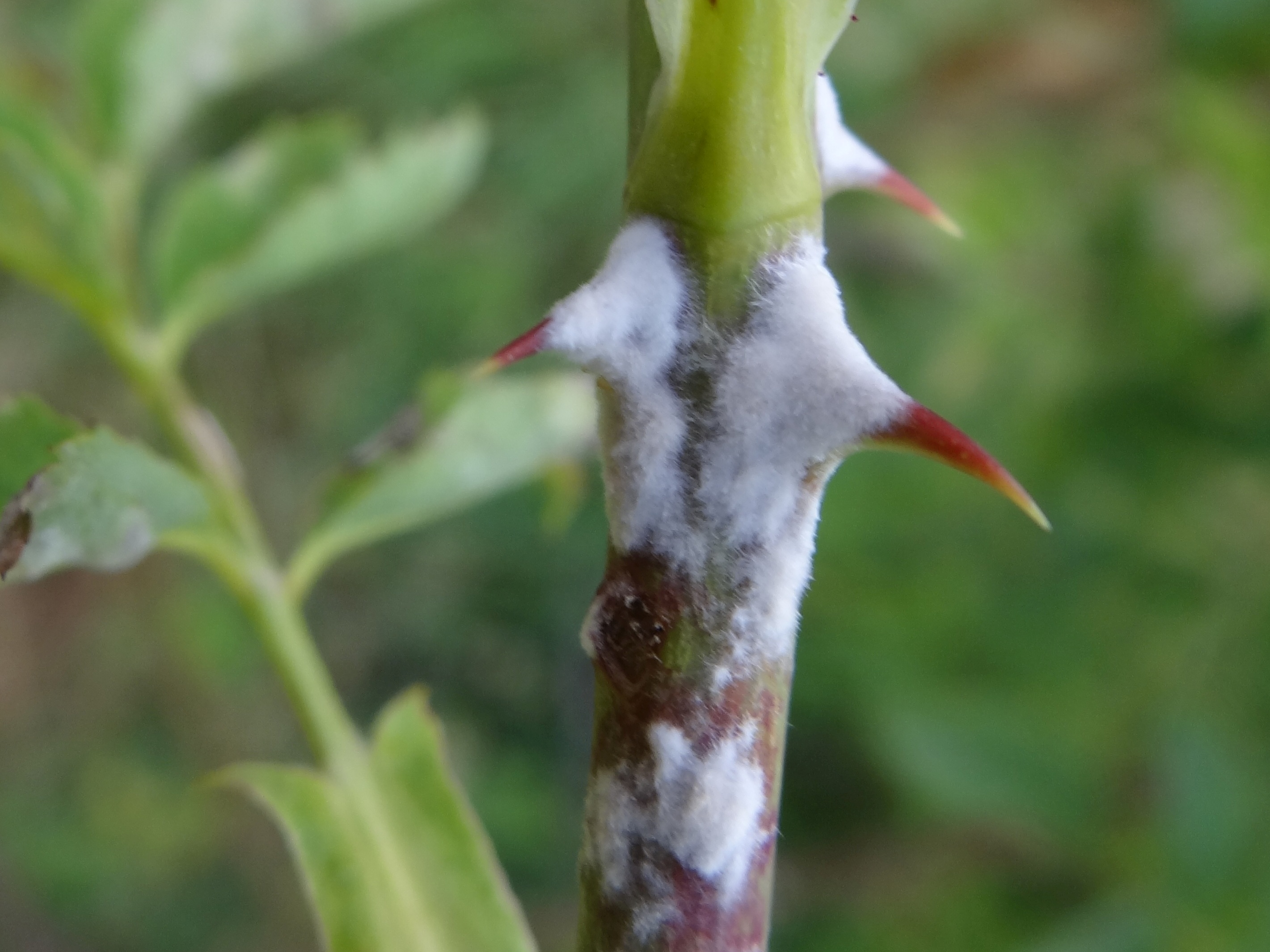 Podosphaera pannosa on Rosa canina